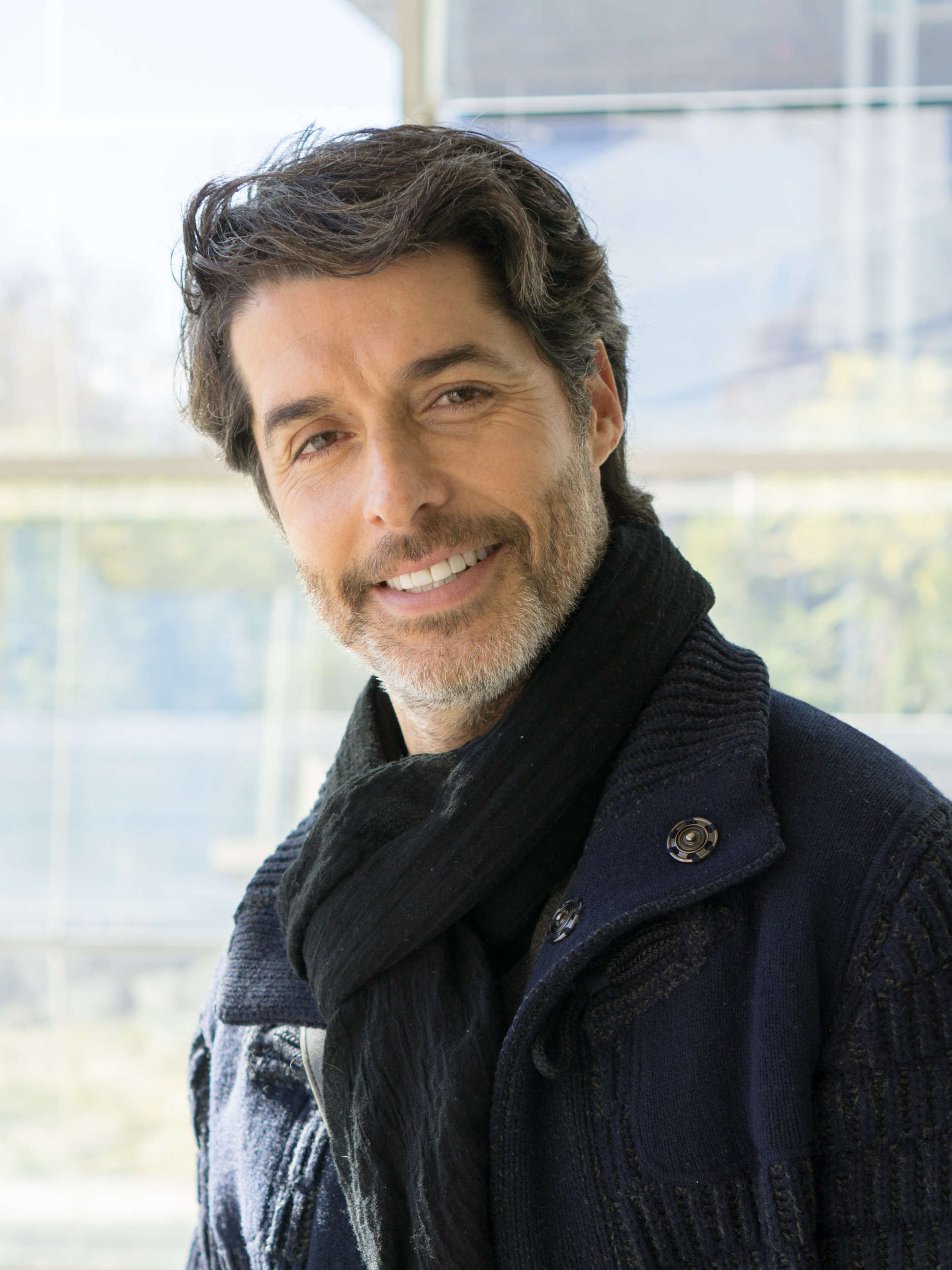 Francisco Pérez-Bannen en 2016, durante la grabación de la telenovela "Preciosas"